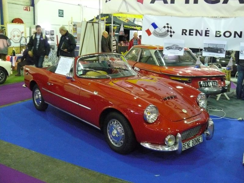 Reims 2012